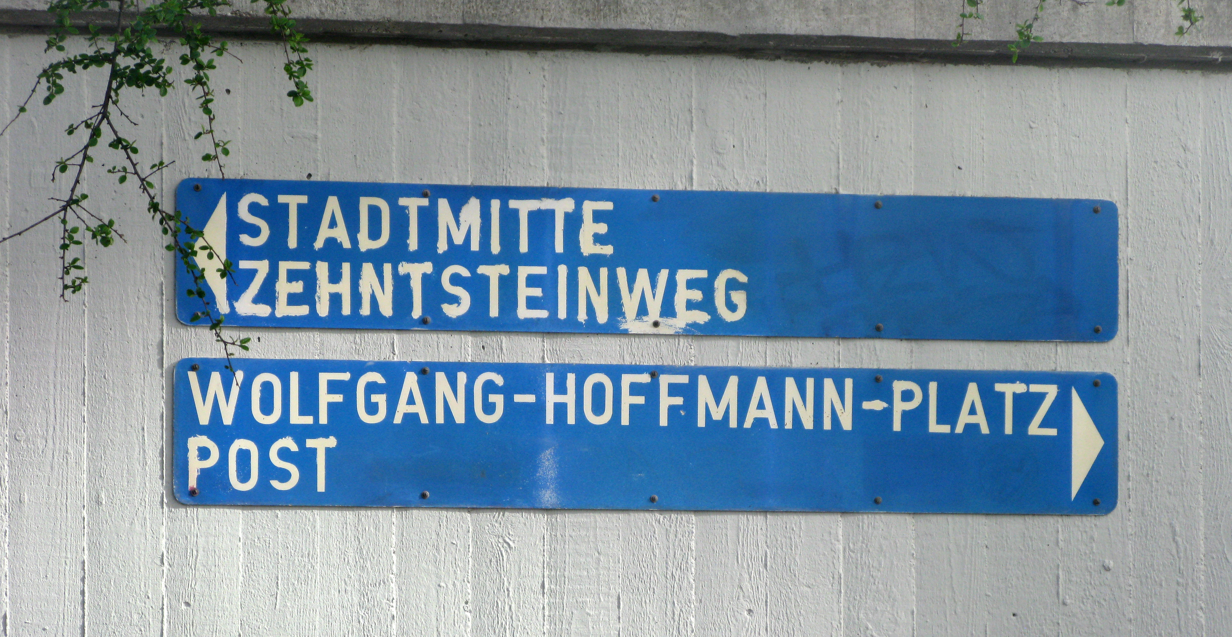 Wegweiser zur Unterführung zum Wolfgang-Hoffmann-Platz in Freiburg-Betzenhausen vor der früheren Oberpostdirektion, benannt nach dem Oberbürgermeister (1945–1956)